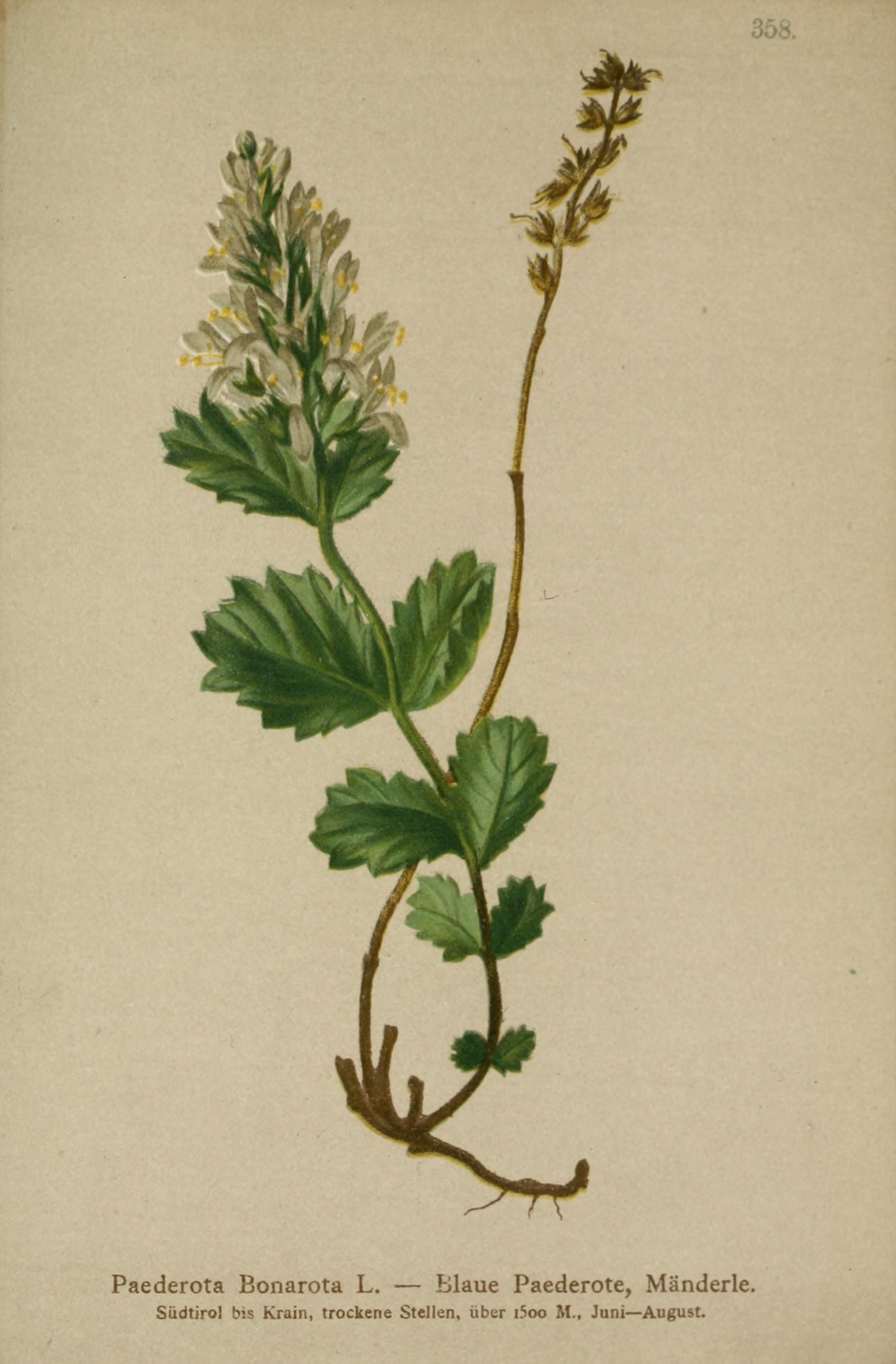 358. Paederota Bonarota L. — Blaue Paederote, Mänderle, Siidtirol bis Krain, trockene Stellen, über ifioo M., Juni— August.